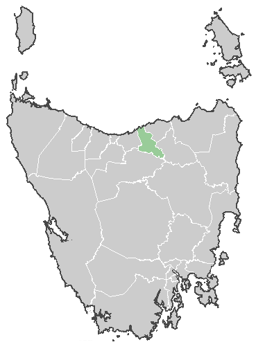 West Tamar Tasmanie Australie